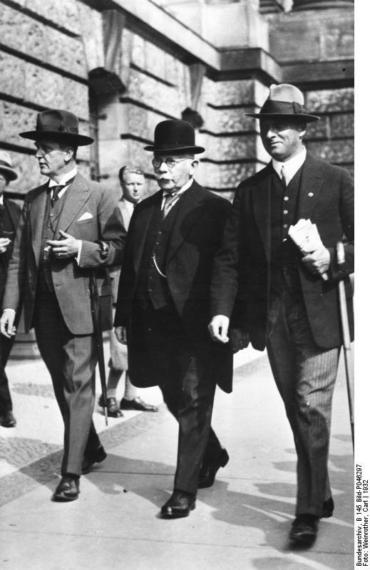 Dr. Hugenberg, auf dem Weg zum Reichstagsgebäude